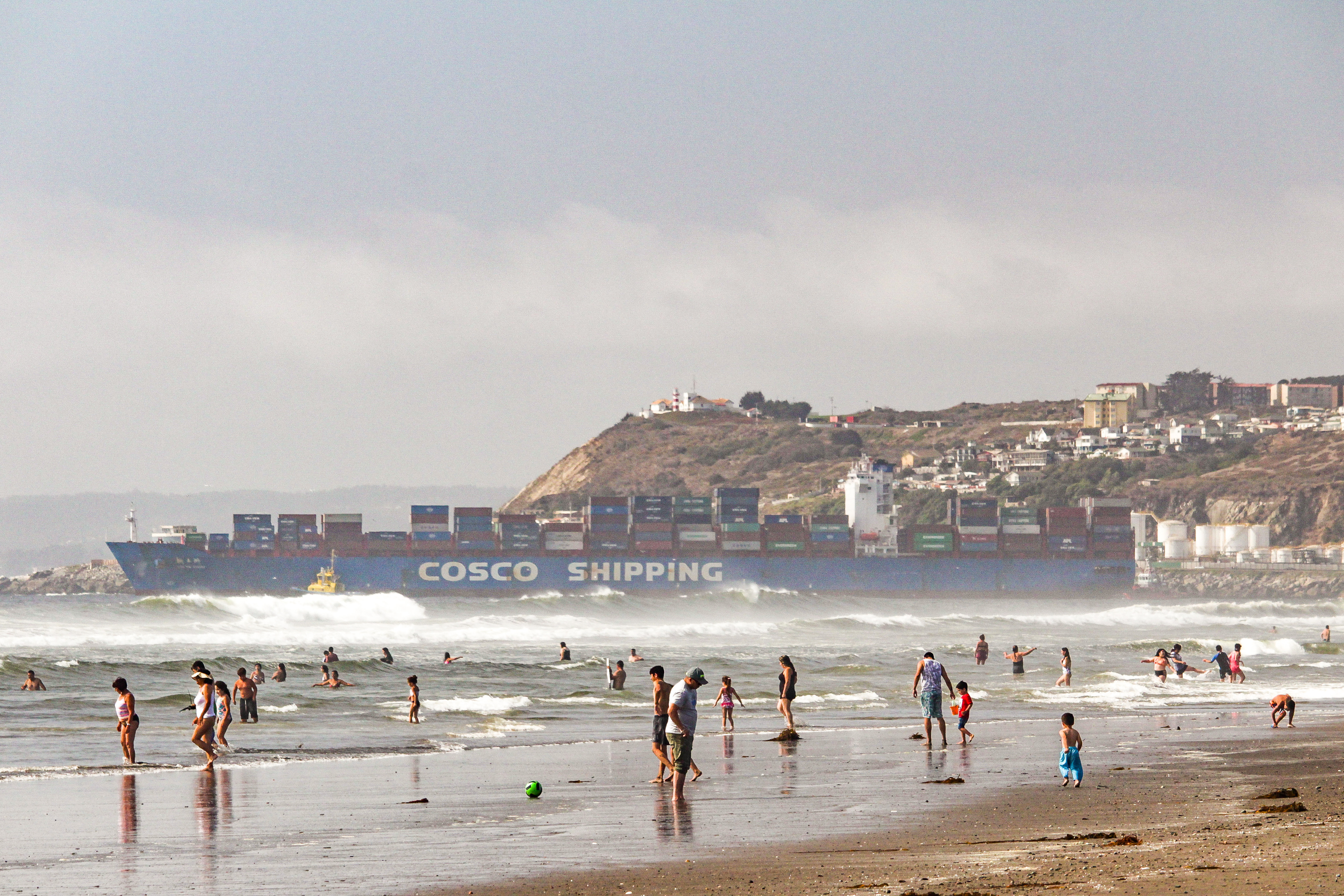 Familias, parejas y visitantes de Llolleo disfrutando de la playa en época estiival.